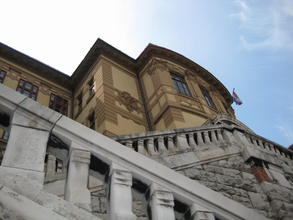 Dio Sudbene palače (arhitekt Stjepan Kiss) koja se gradila od 1905. g. do 11. svibnja 1906. godine.